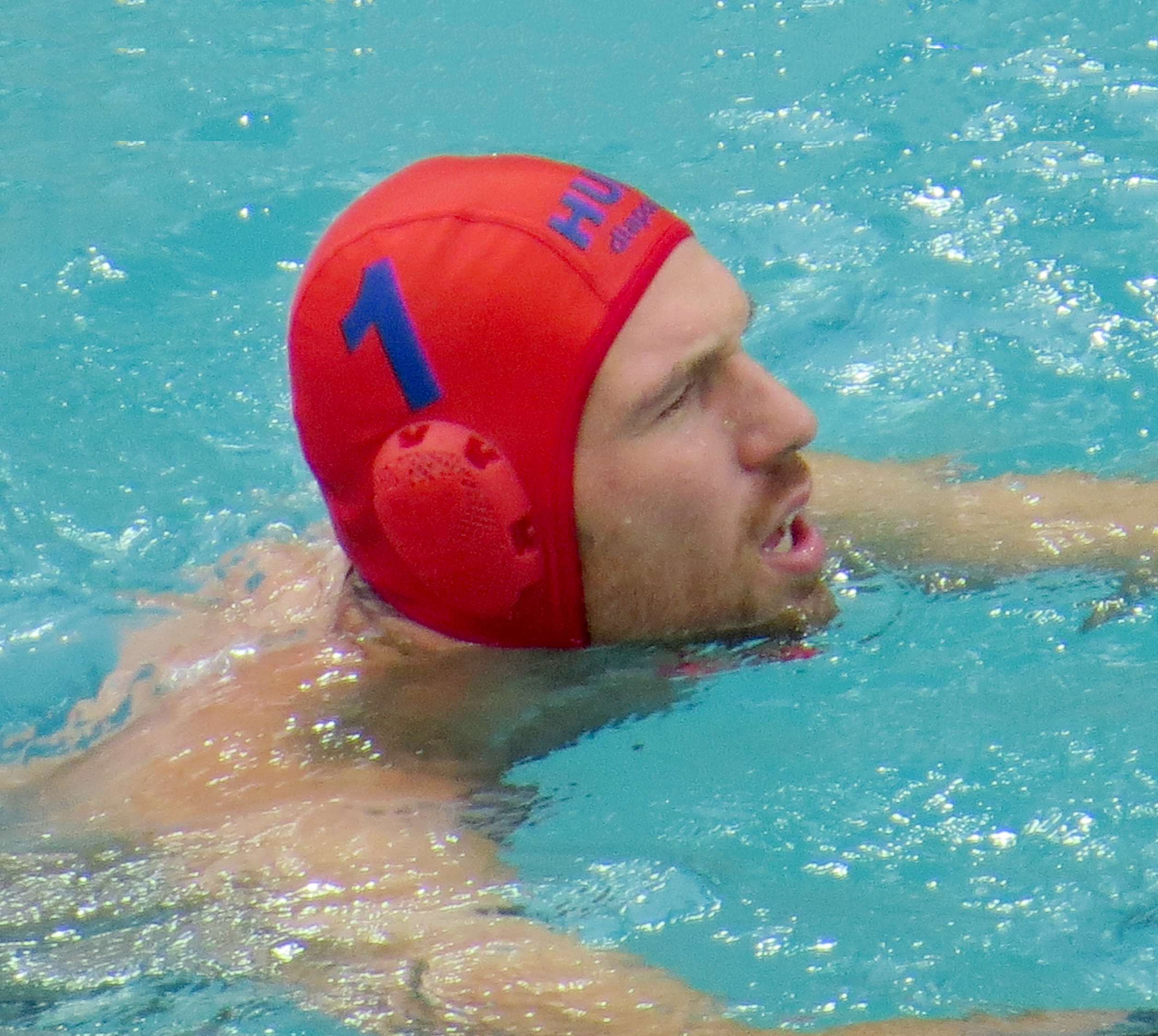 Rio 2016. Polo aquatico. sx50 91